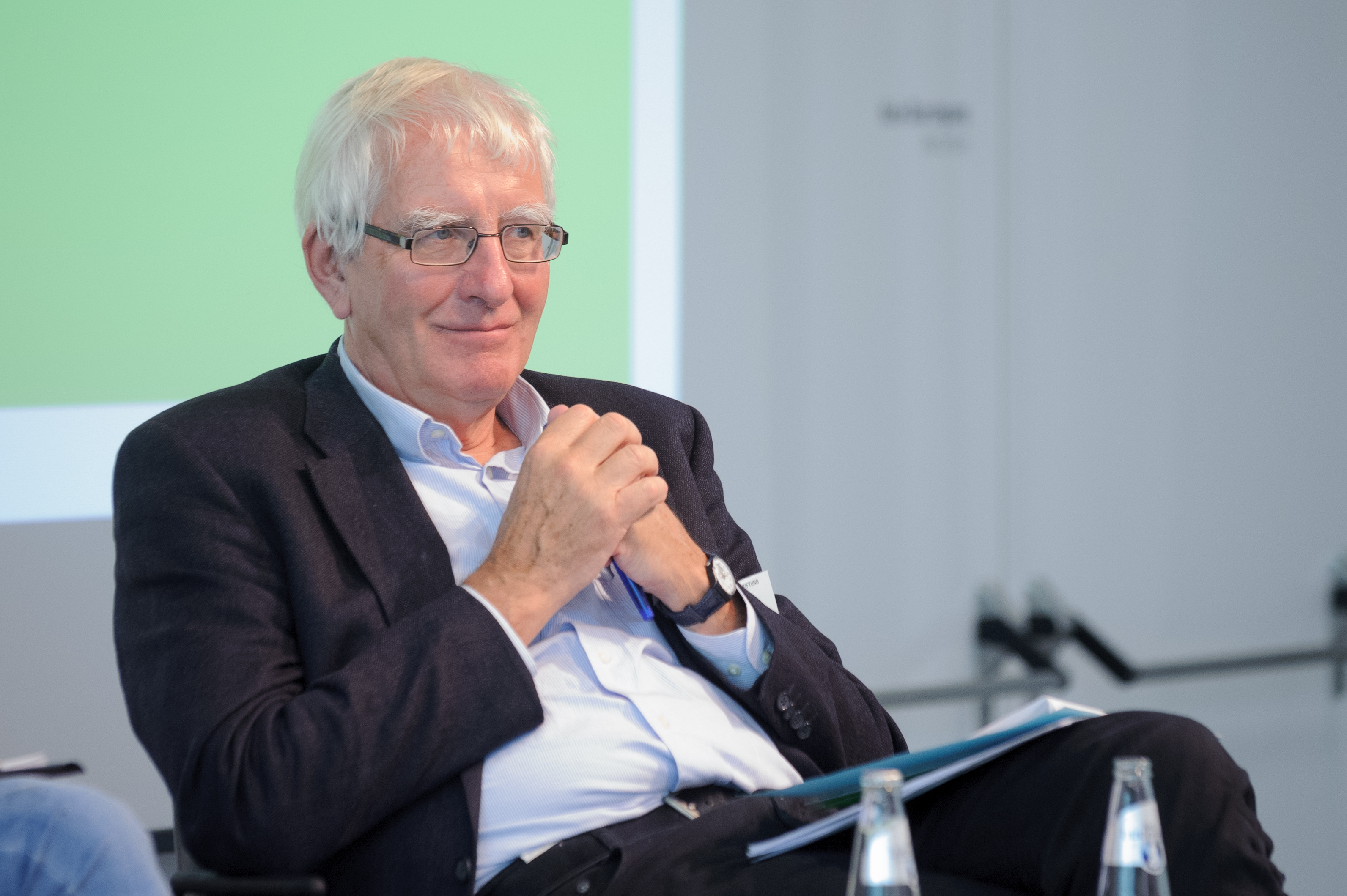 Prof. em. Dr. Heinz-Gerhard Haupt (Senior Professor an der Uni Bielefeld) 1848 und Europa Foto: Stephan Röhl (